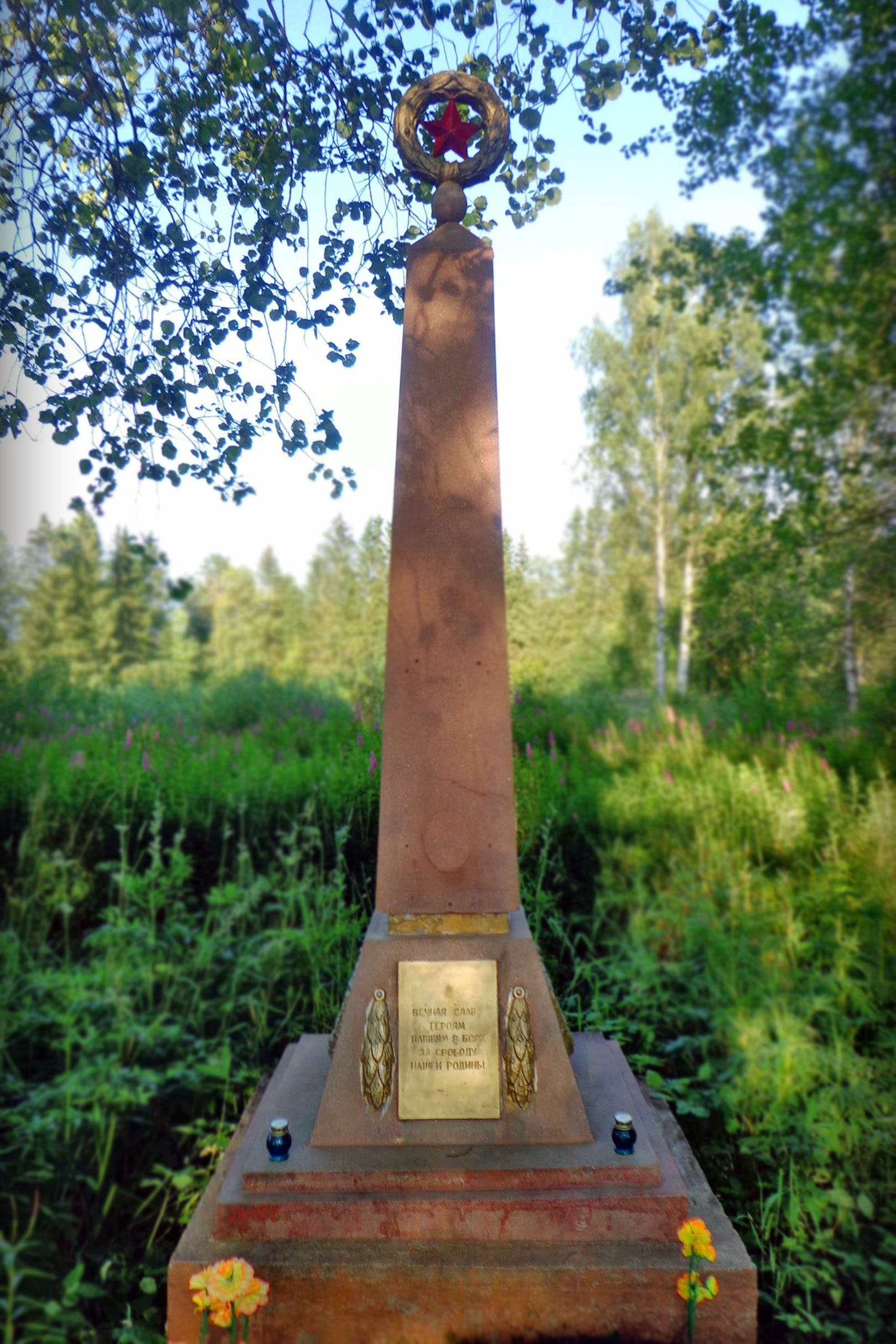 Братская могила советских воинов 168-й стрелковой дивизии, 367-го полка 71-й стрелковой дивизии (7-я армия) и 3-го погранотряда, погибших в июле-августе 1941 года в оборонительных боях Советско-финской войны (1941—1944). Республика Карелия, Питкярантский р-н, Харлу, Главное шоссе, напротив д. 8 и съезда на 10-ю Речную улицу. Список захороненных